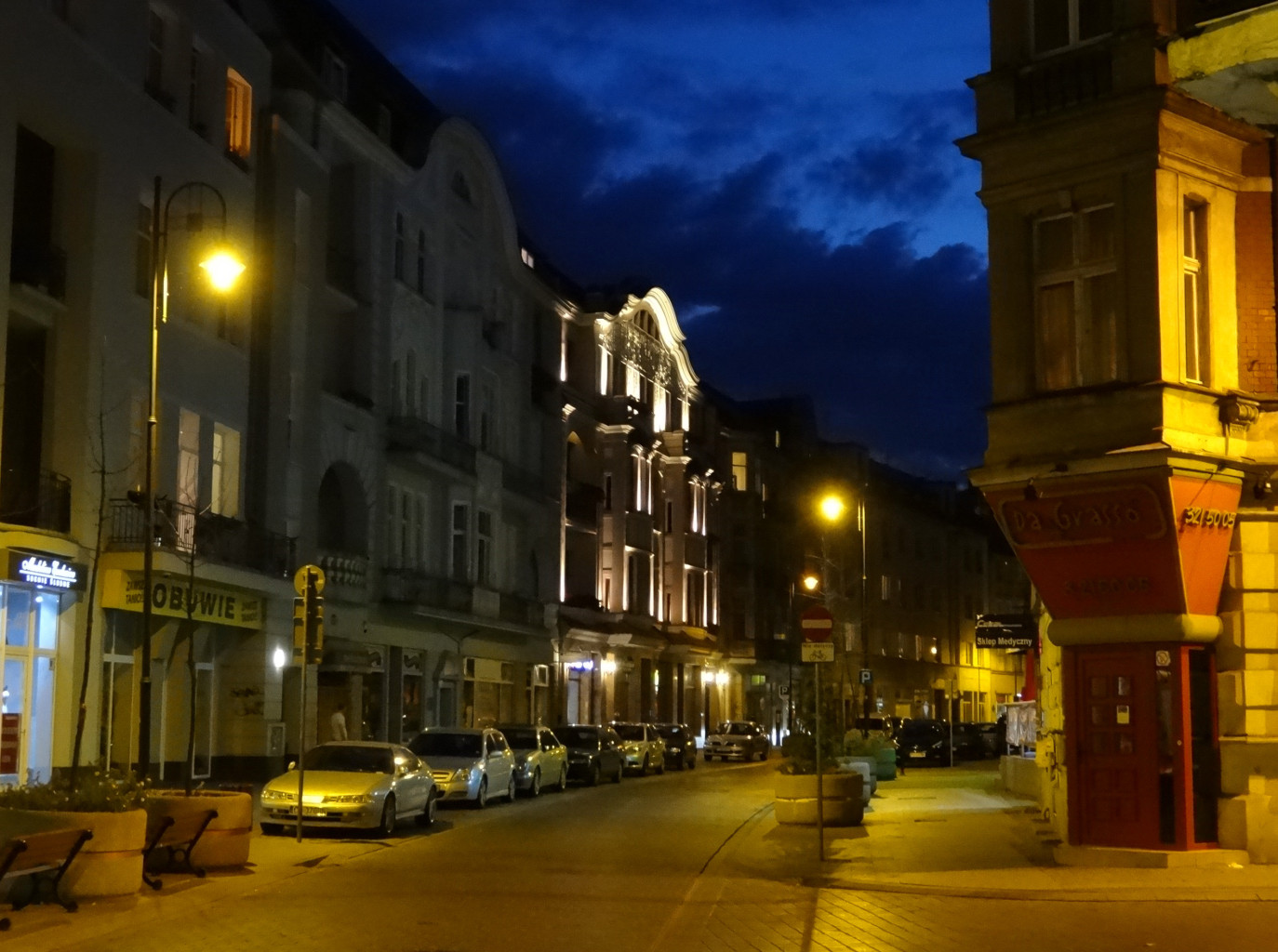 Ulica Dworcowa w Bydgoszczy